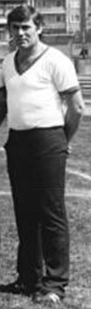 Title: Mannschaftsfoto BSG Motor Suhl Factual corrections and alternative descriptions are encouraged separately from the original description. Additionally errors can be reported at this page to inform the Bundesarchiv. Original historic description: ADN-ZB Schaar 16.6.84 Suhl: Aufsteiger zur Fußball-Oberliga 1984-85: BSG Motor Suhl. Einen Spieltag vor Abschluß der Aufstiegsrunde sicherte sich die BSG Motor Suhl einen der beiden freien Plätze in der Fußball-Oberliga. Die Thüringer spielen damit in der nächsten Serie erstmals in der höchsten DDR-Fußballklasse. Hintere Reihe v.l.n.r.: Trainer Paul Kersten, Wolfgang Reuter, Peter Staps, Hartmut Weiß, Andreas Böhm, Roman Seyfarth, Andreas Schneider, Dieter Kurth, Klaus Schröder, Matthias Brückner, Erhard Mosert, Gerd Schellhase, Mannschaftsleiter Frank Hoffmann und Trainer Ernst Kurth. Vordere Reihe v.l.n.r.: Masseur Peter Eichelbrenner, Klaus Semineth, Dieter Erhardt, Jürgen Schneider, Torhüter Walter Jänicke, Torhüter Klaus Müller, Ralf Eismann, Uwe Jertschewski, Uwe Trömel und Trainer Burkhardt Winkler.